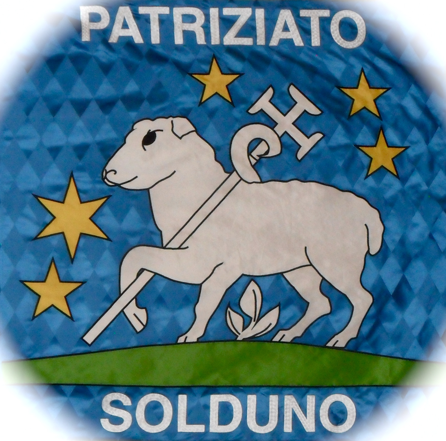 Vessillo del Patriziato di Solduno